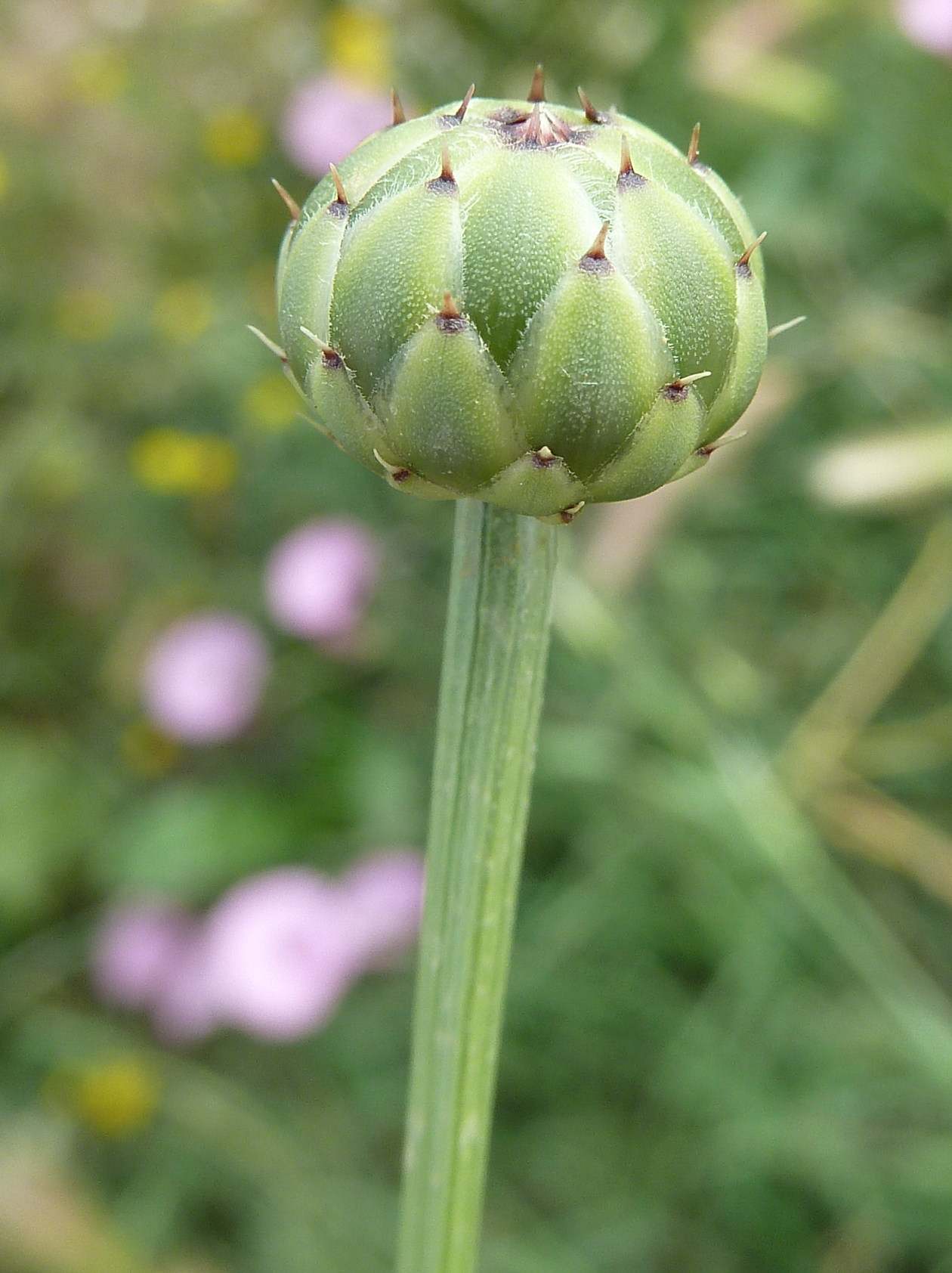 Mantisalca salmantica (L.) Briq. & Cavill. - Prefloración - Albatera (Alicante, España)